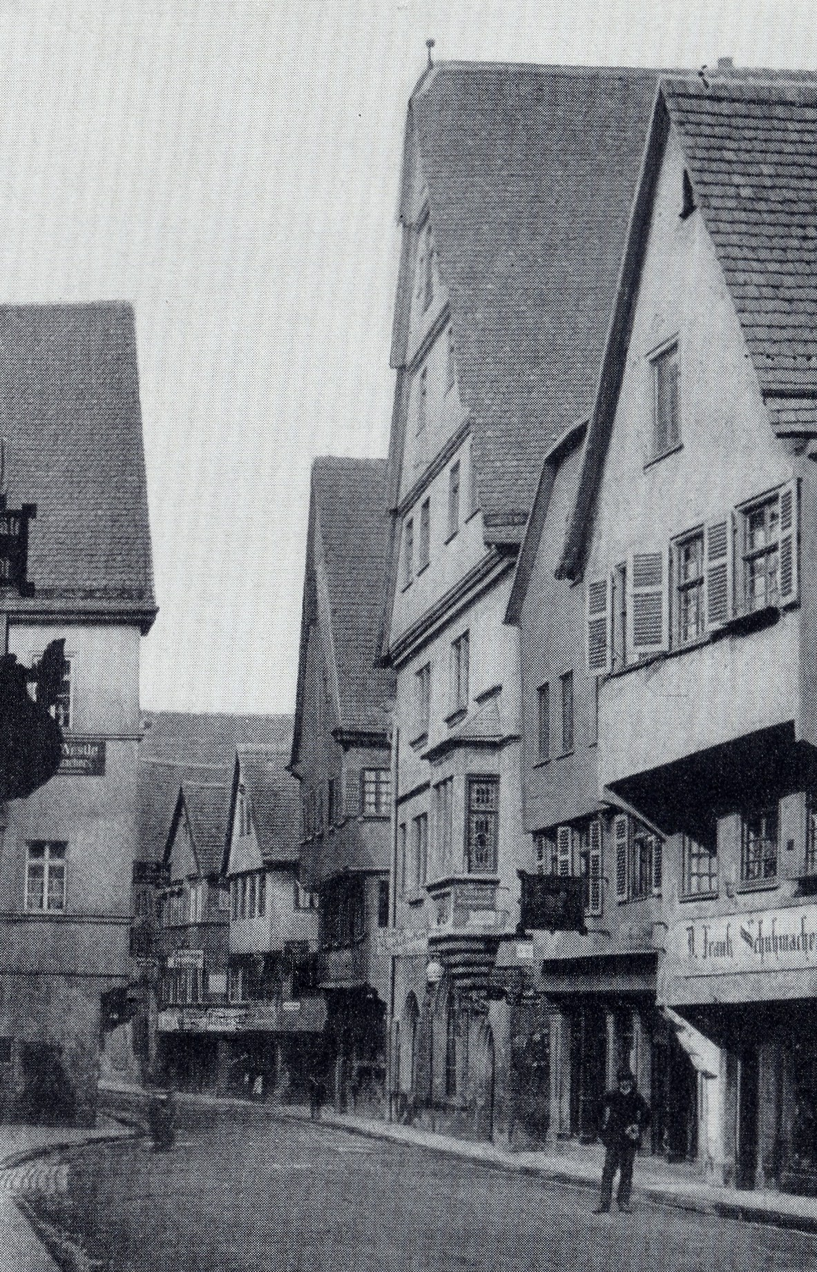 Heilbronn, Imlin'sches Haus, Kirchbrunnenstraße 15 erbaut von 1535 bis 1585, Außen (Quelle - Schmolz/Weckbach Die alte Stadt in Wort und Bild 1966. Konrad-Verlag, Heilbronn).